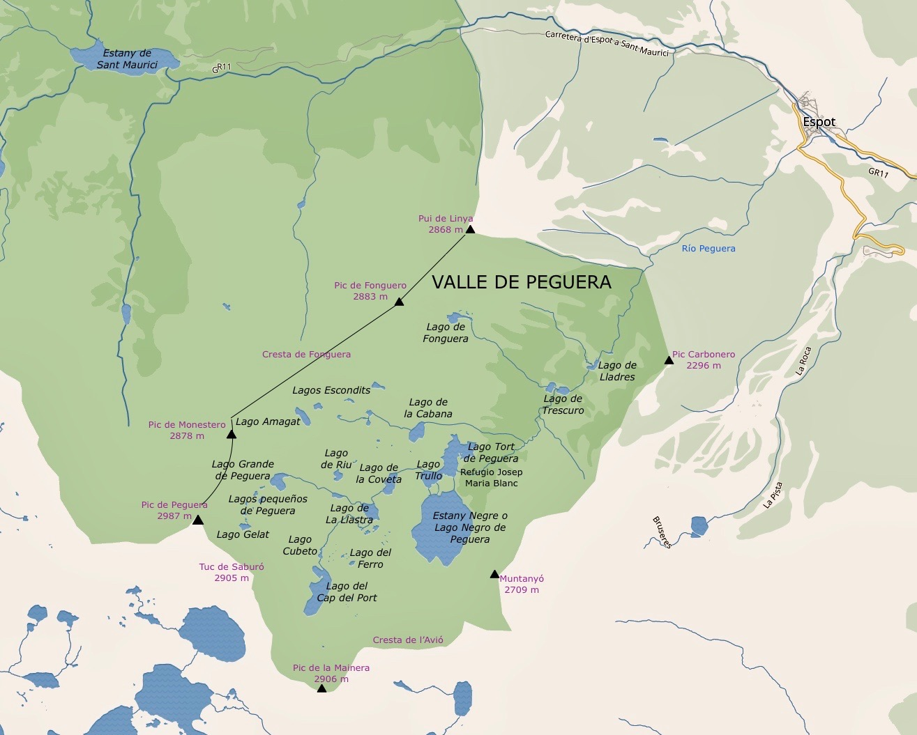 Mapa de Wikimedia maps del Pirineo de Lérida al que se han añadido los nombres de los lagos del valle de Peguera para la entrada correspondiente